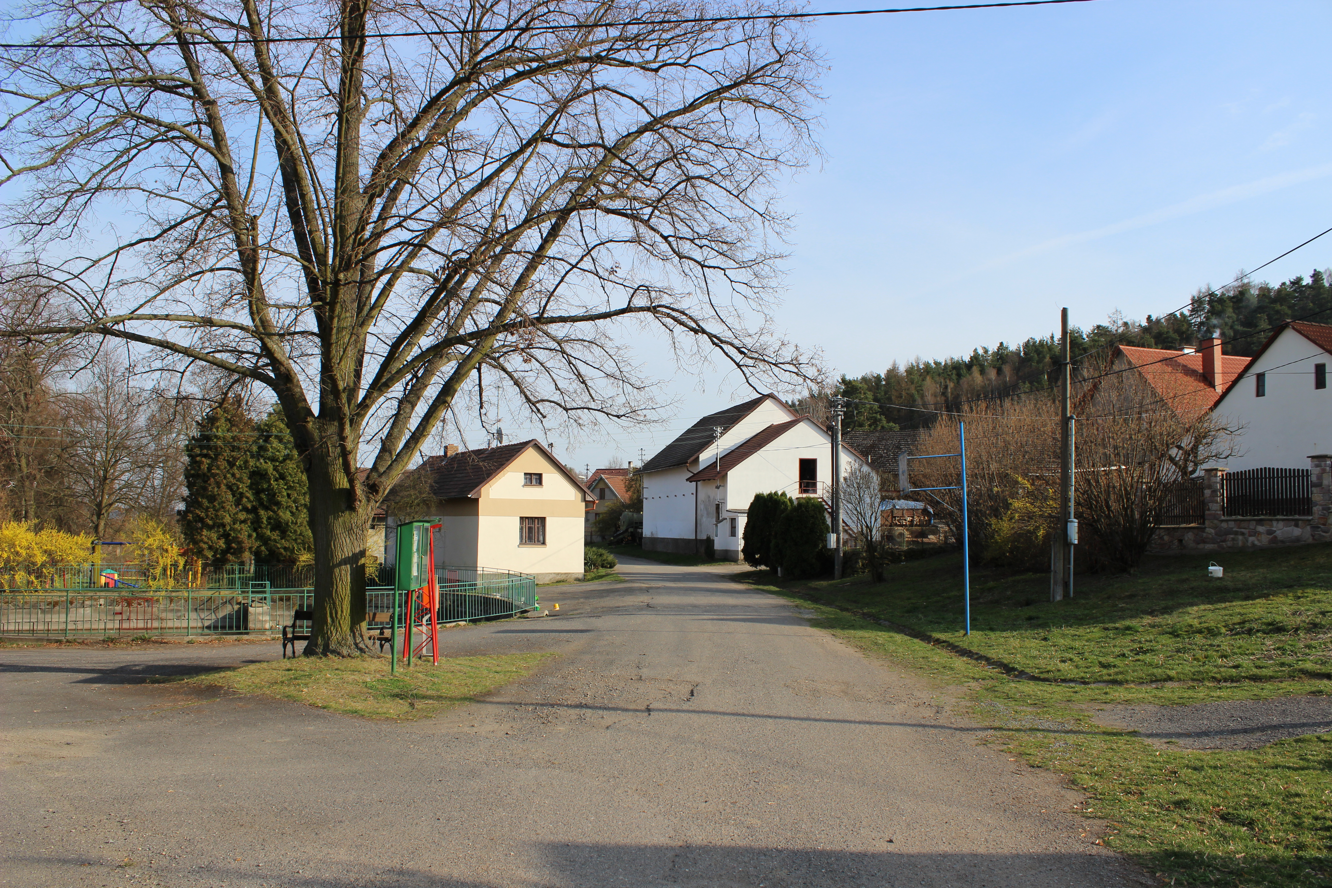 Náves v Křeničné, části Chotilska (pohled od severozápadu). Na modré tyči vpravo od silnice je připevněn koš na košíkovou (hraje se zde přímo na silnici na návsi). This photograph was taken with a Canon EOS 600D.